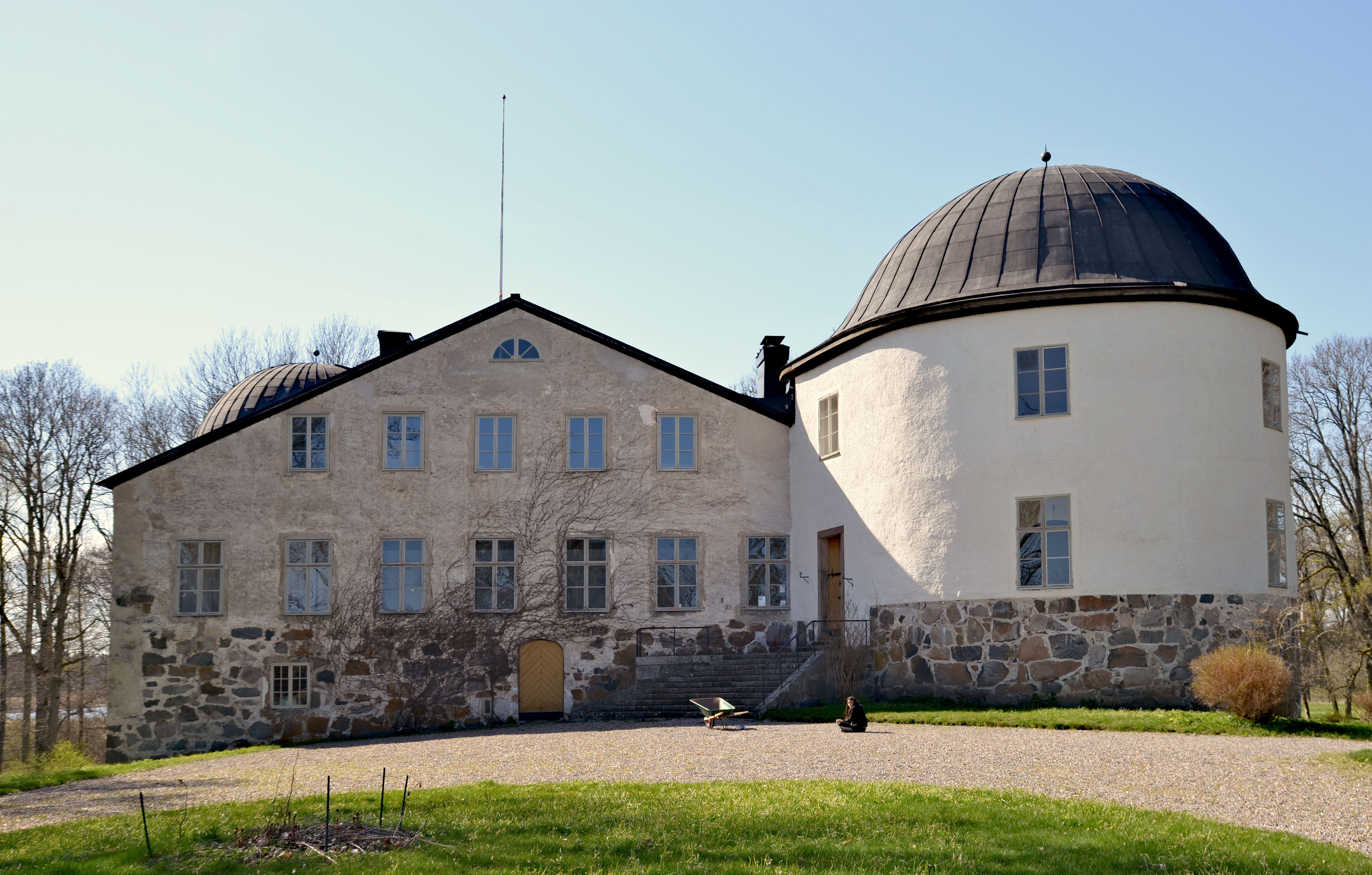 Gård och entré till Penningby slott.